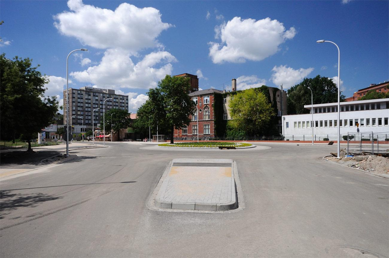 Nowe rondo przy skrzyżowaniu ulic Wielkiej i Kruczej. Drzewko w środku ronda daje nam pewne wyobrażenie o tym jak zmienił się układ ulic w tym rejonie